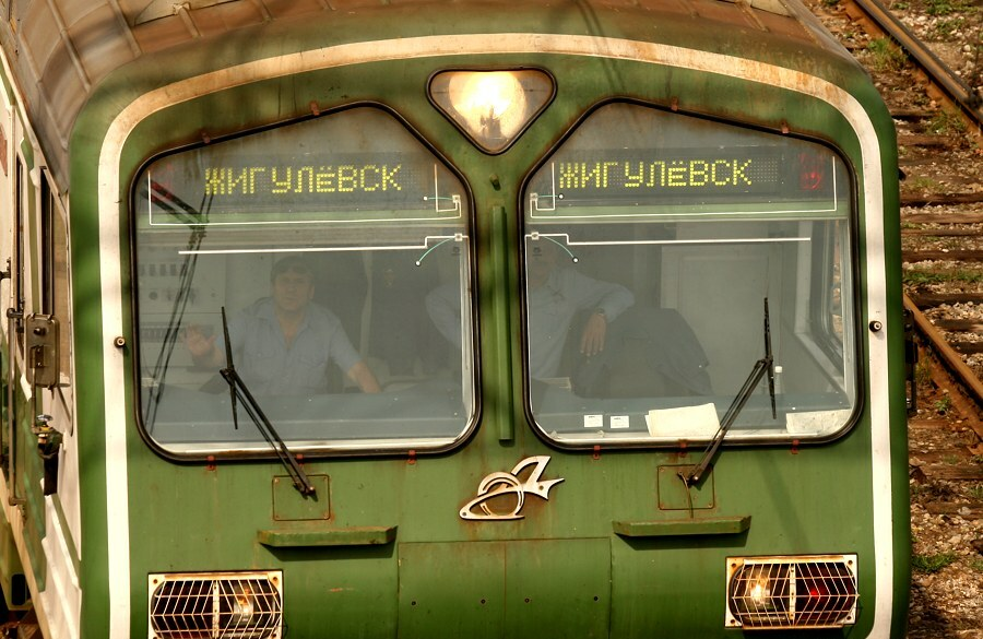 Электричка Тольятти-Жигулёвск, Россия